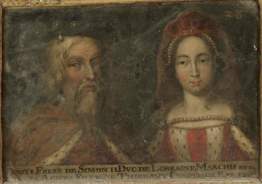 Portrait de Ferry II, duc de Lorraine de 1205 à 1213, et de son épouse Agnès de Bar. Ce tableau fait partie d'une suite d'une soixantaine de double-portraits représentant les ducs et duchesses de Lorraine ainsi que leurs ancêtres supposés. Ferry Ier de Bitche n'étant pas représenté dans cette généalogie, la numérotation est modifiée. Musée des Offices, Florence (Inv. 1890, 623)